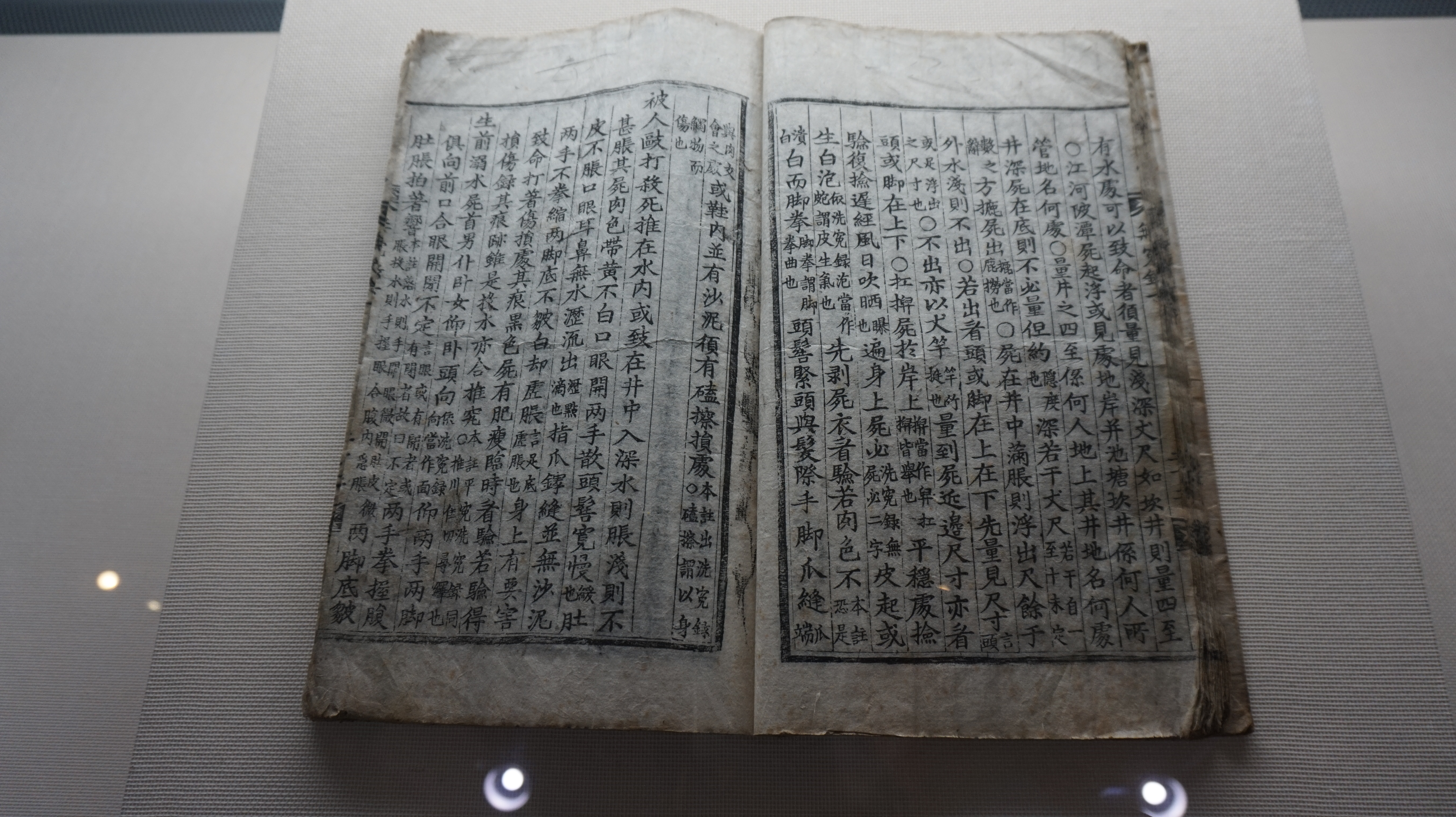 신주무원록 (1)